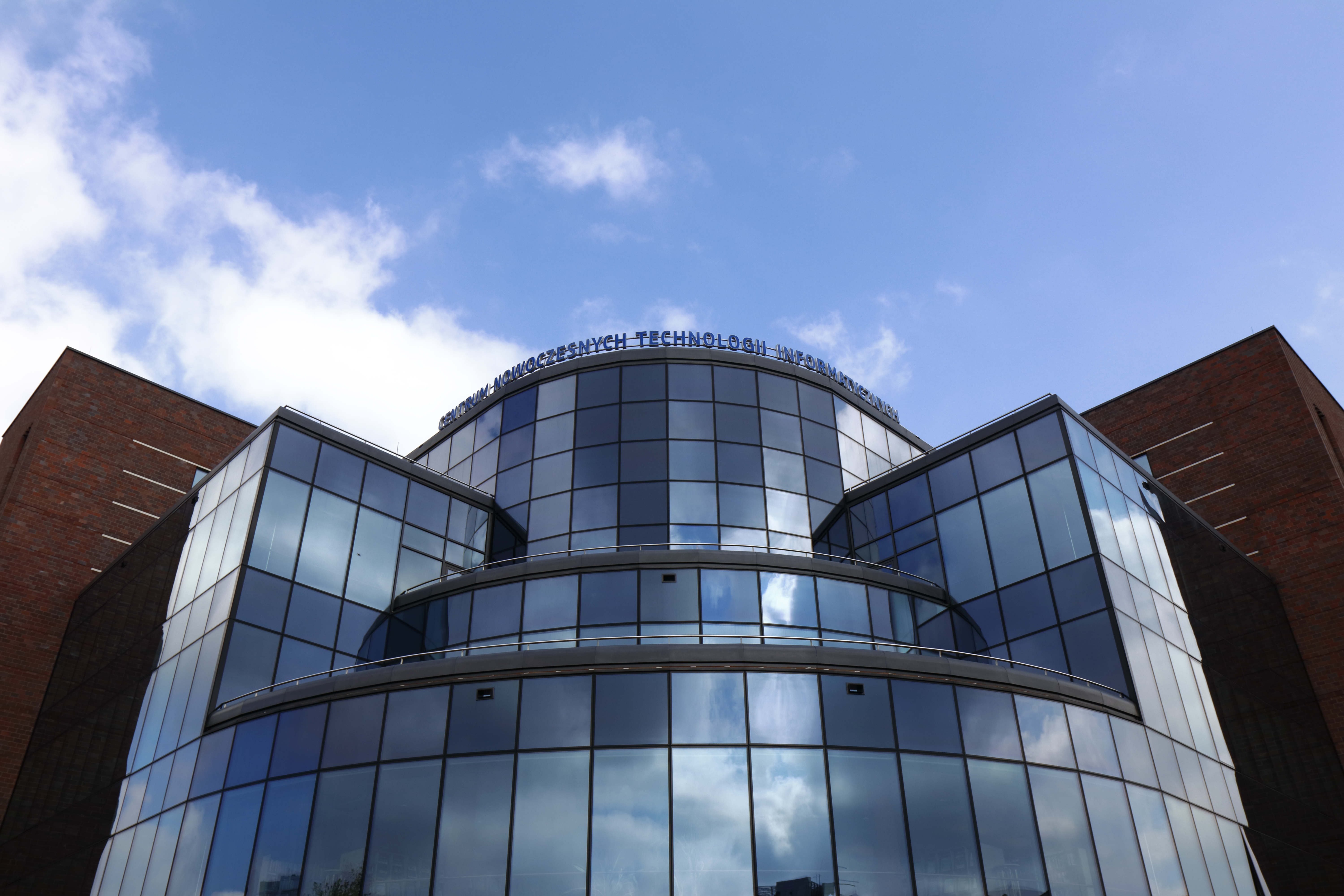 Widok z przodu na Uniwersytet Ekonomiczny w Katowicach